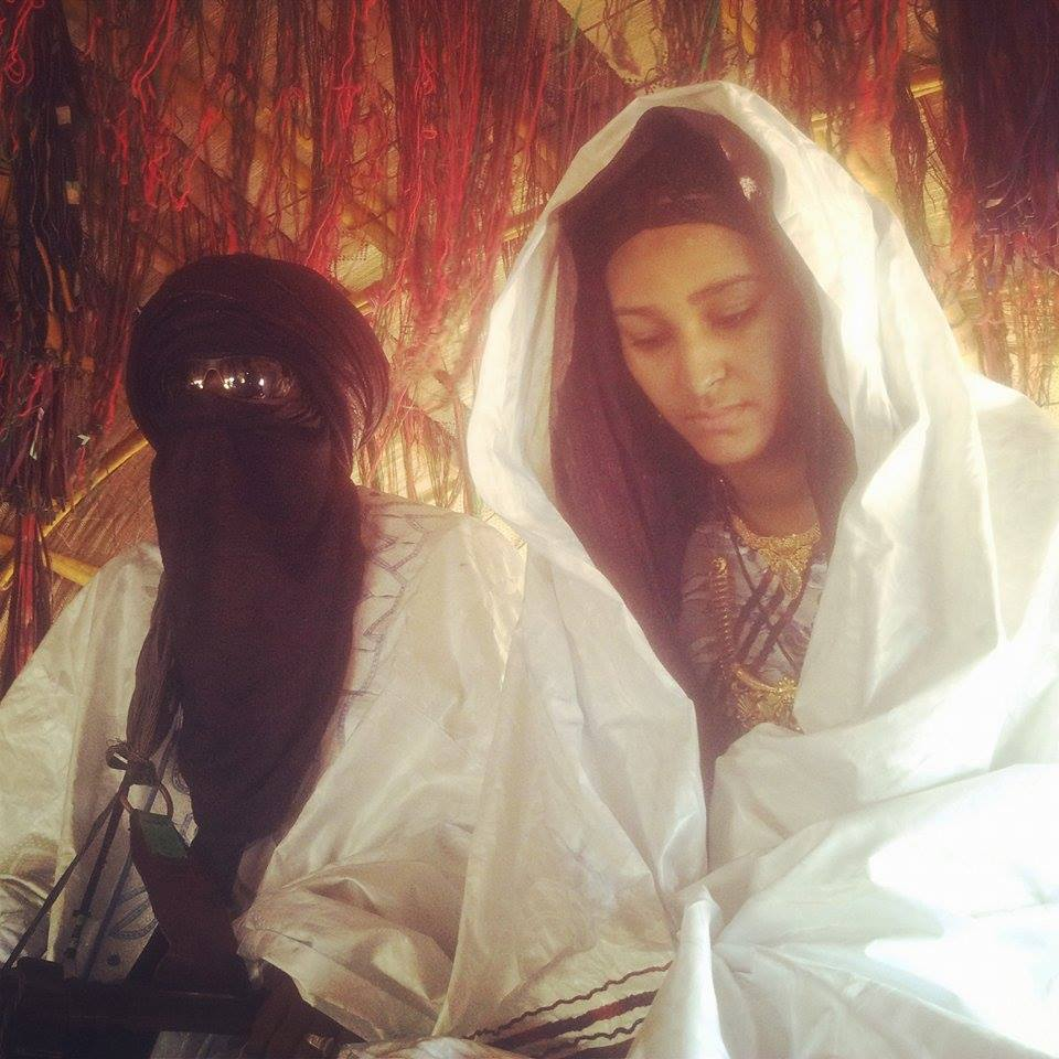 Mari et Femme sous la tente.